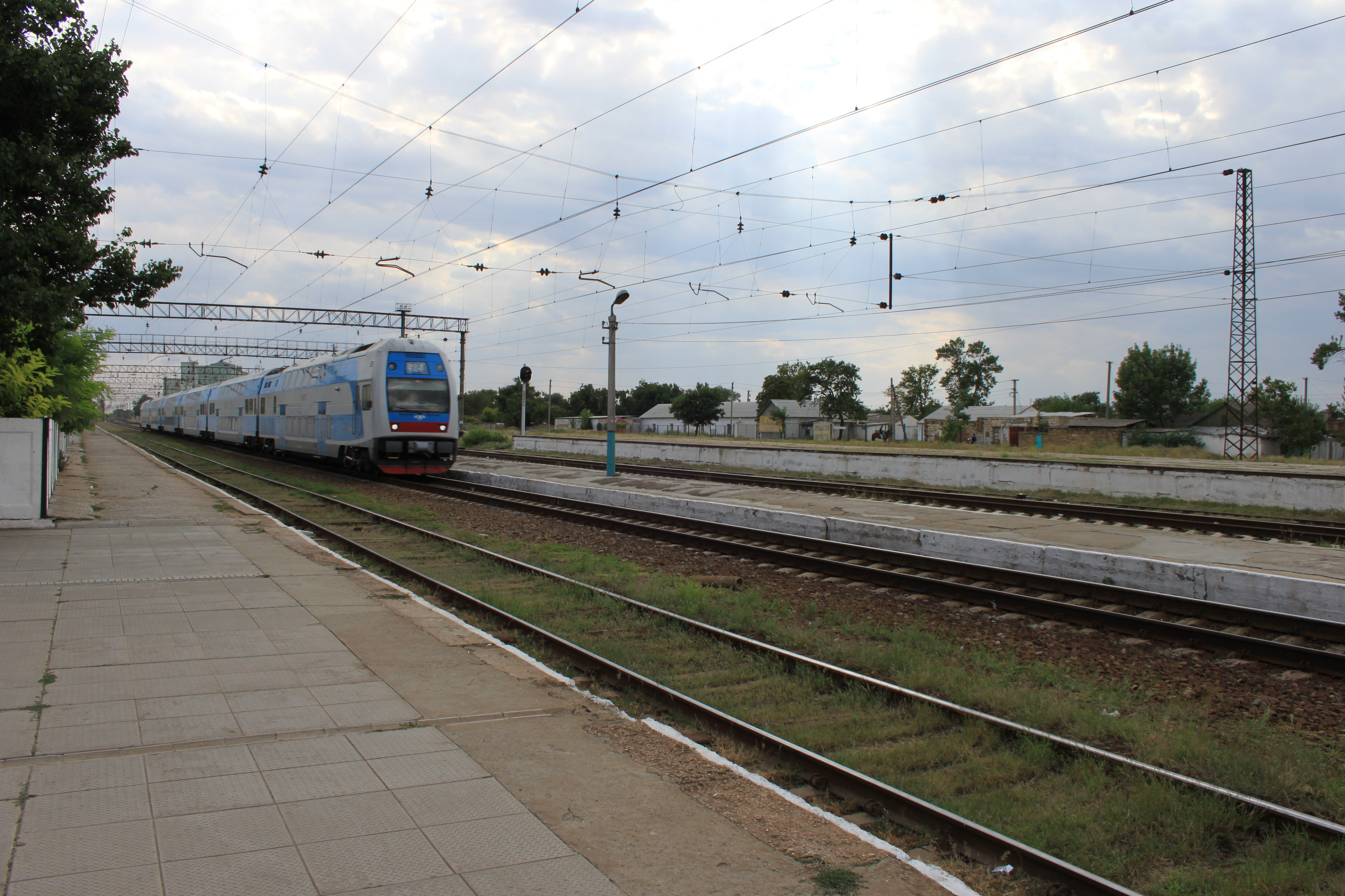 Октябрьское, Элеваторная, 23.08.2013